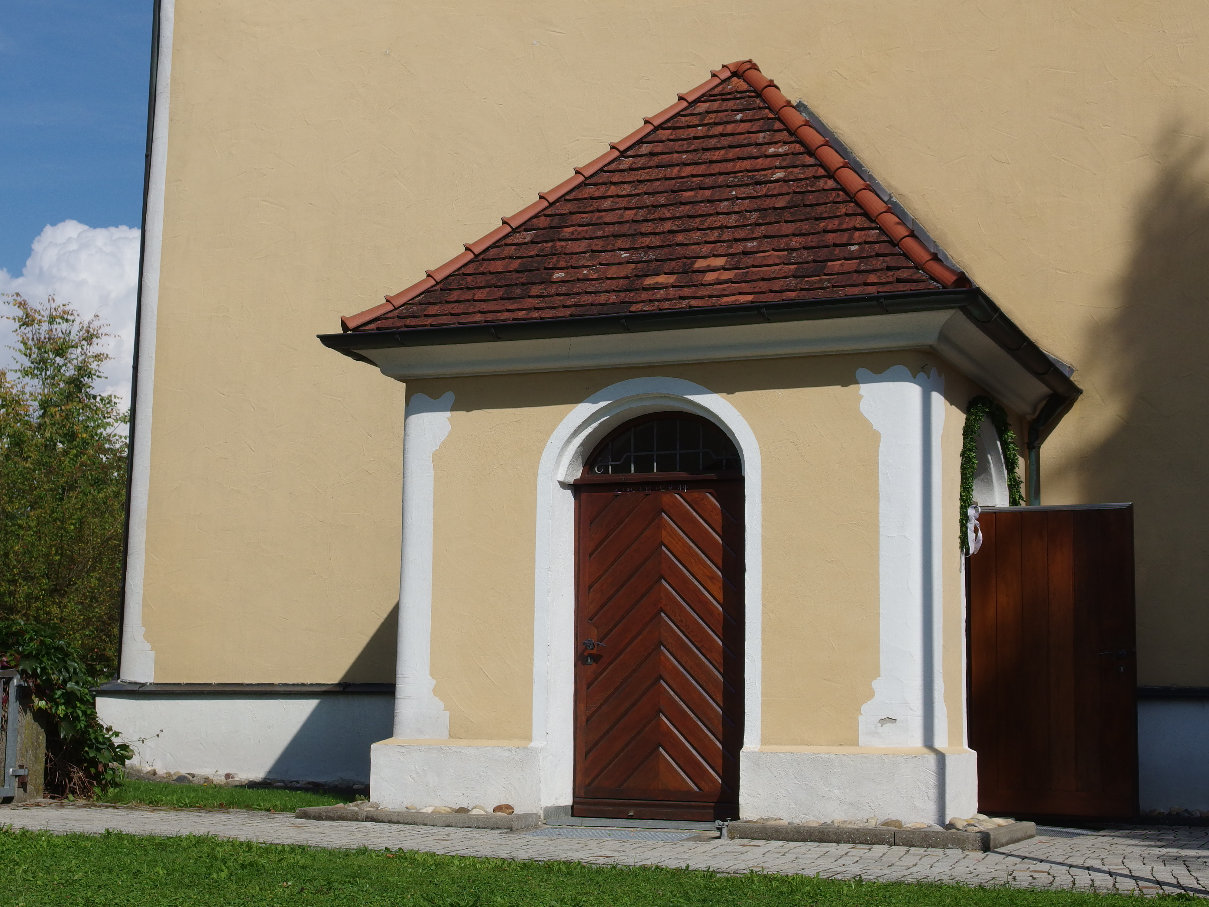 Genderkingen, Kirchplatz 1 Kath.Pfarrkirche St. Peter und Paul; von West; VorzeichenThis is a photograph of an architectural monument.